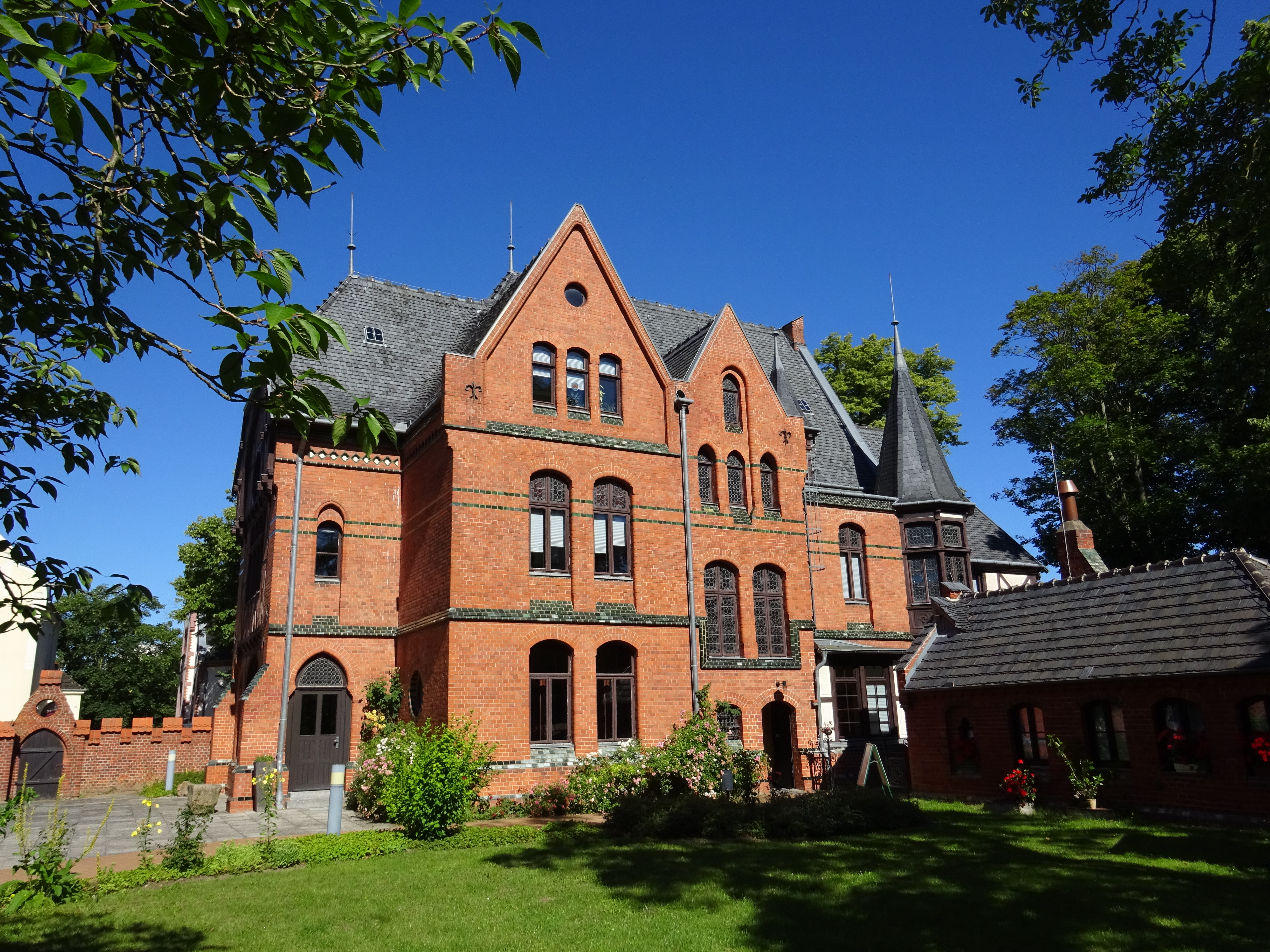 Möckelhaus in Bad Doberan (nach der Sanierung)